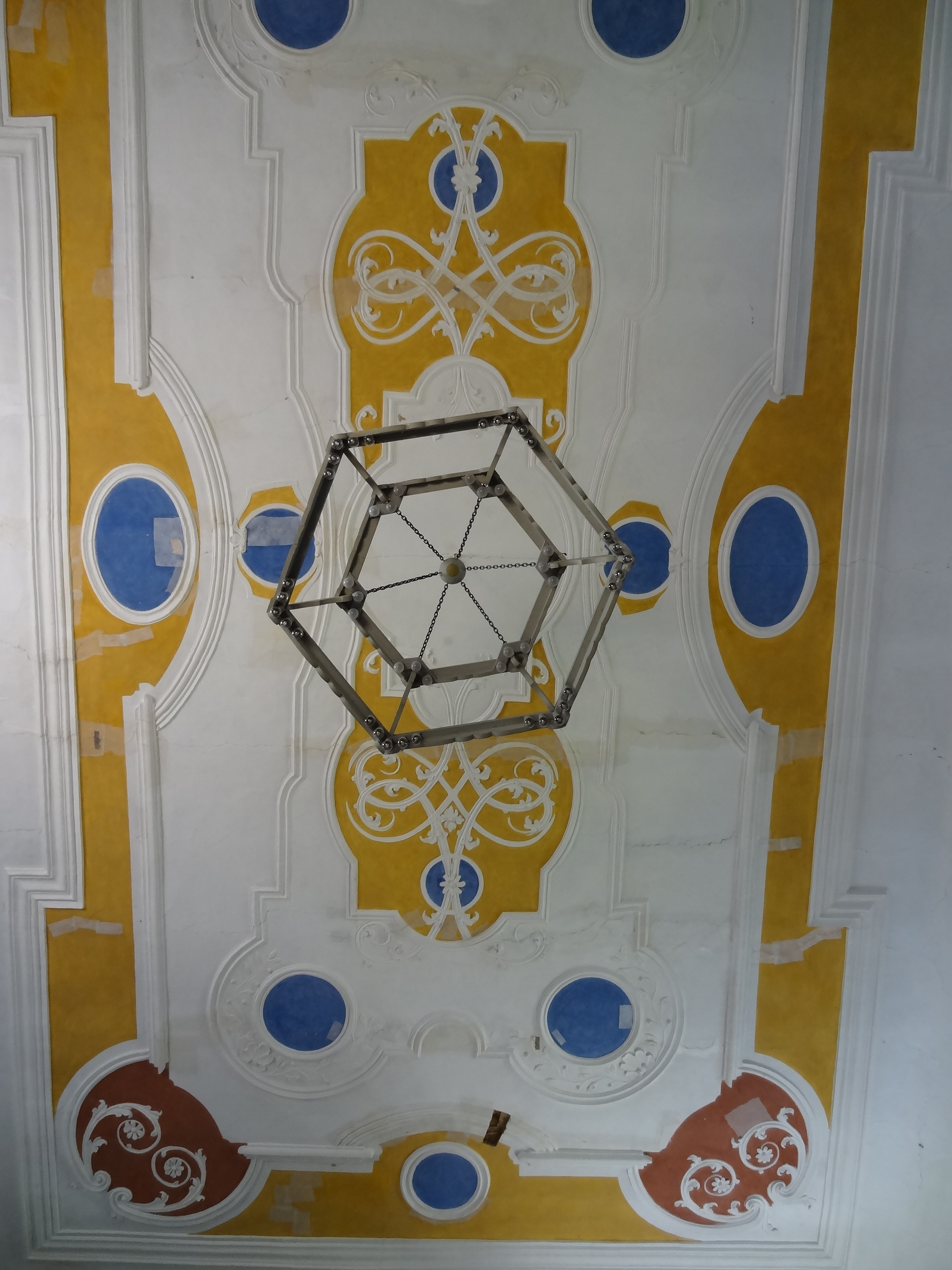 Evangelische Kirche Obbornhofen